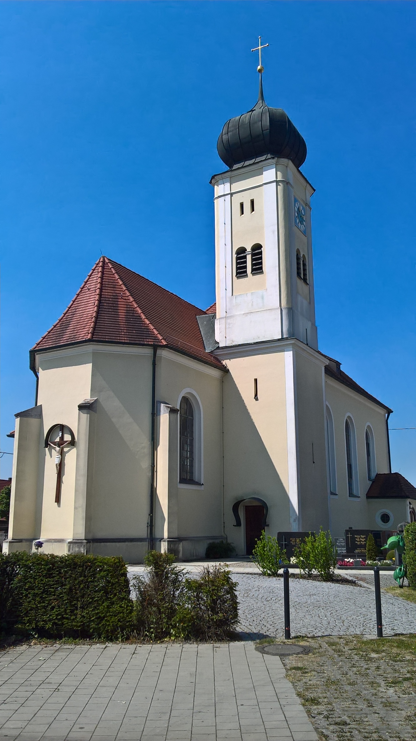 Katholische Kirche Maria Immaculata Donauwörth-Nordheim, Gesamtansicht